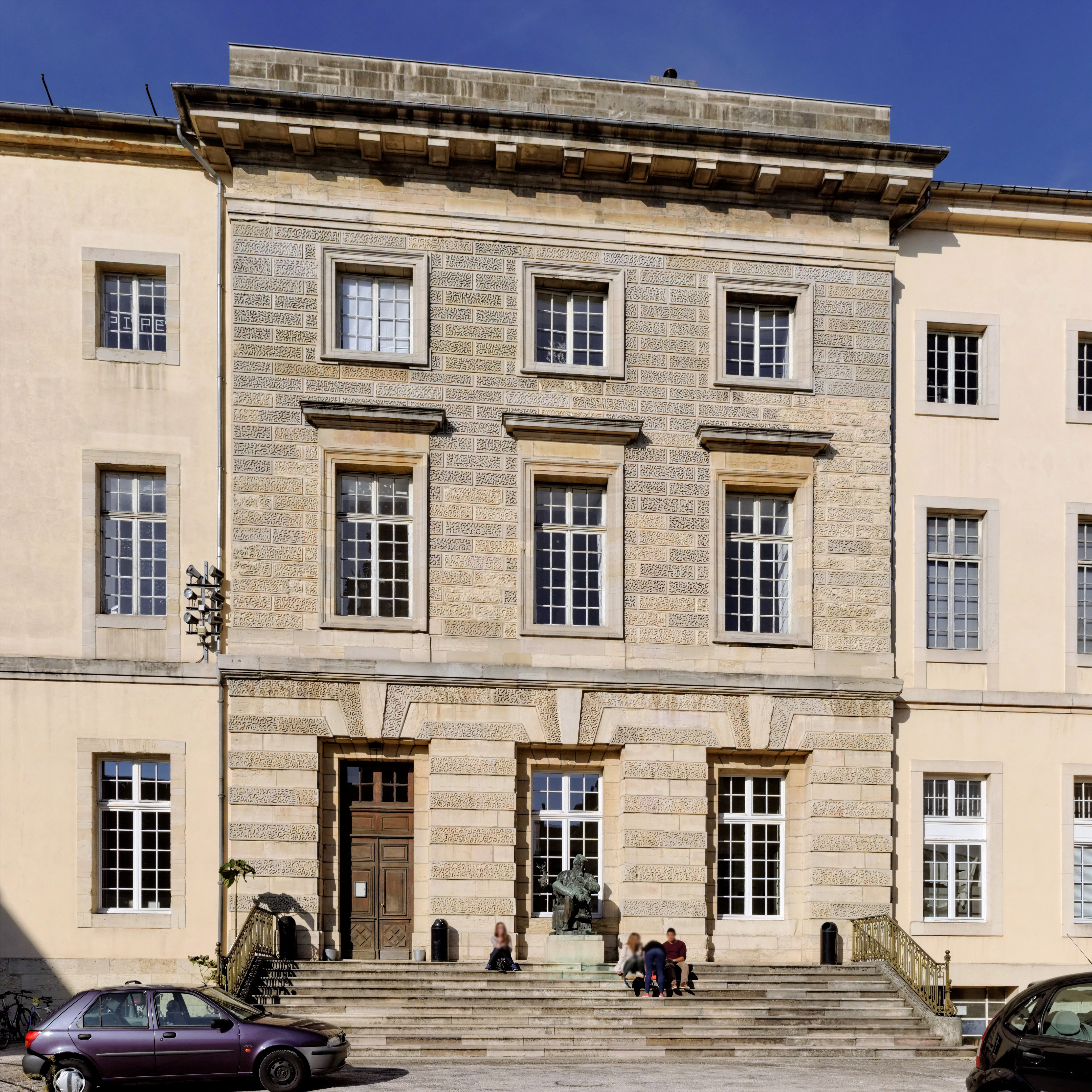 Palais abbatial Saint Bénigne, Actuelle École Nationale Supérieure d'Art de Dijon, (Côte d'Or, Bourgogne, France).